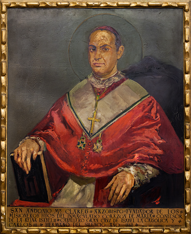 Pintura de San Antonio Maria Claret situada en la Iglesia de San Antonio Abad